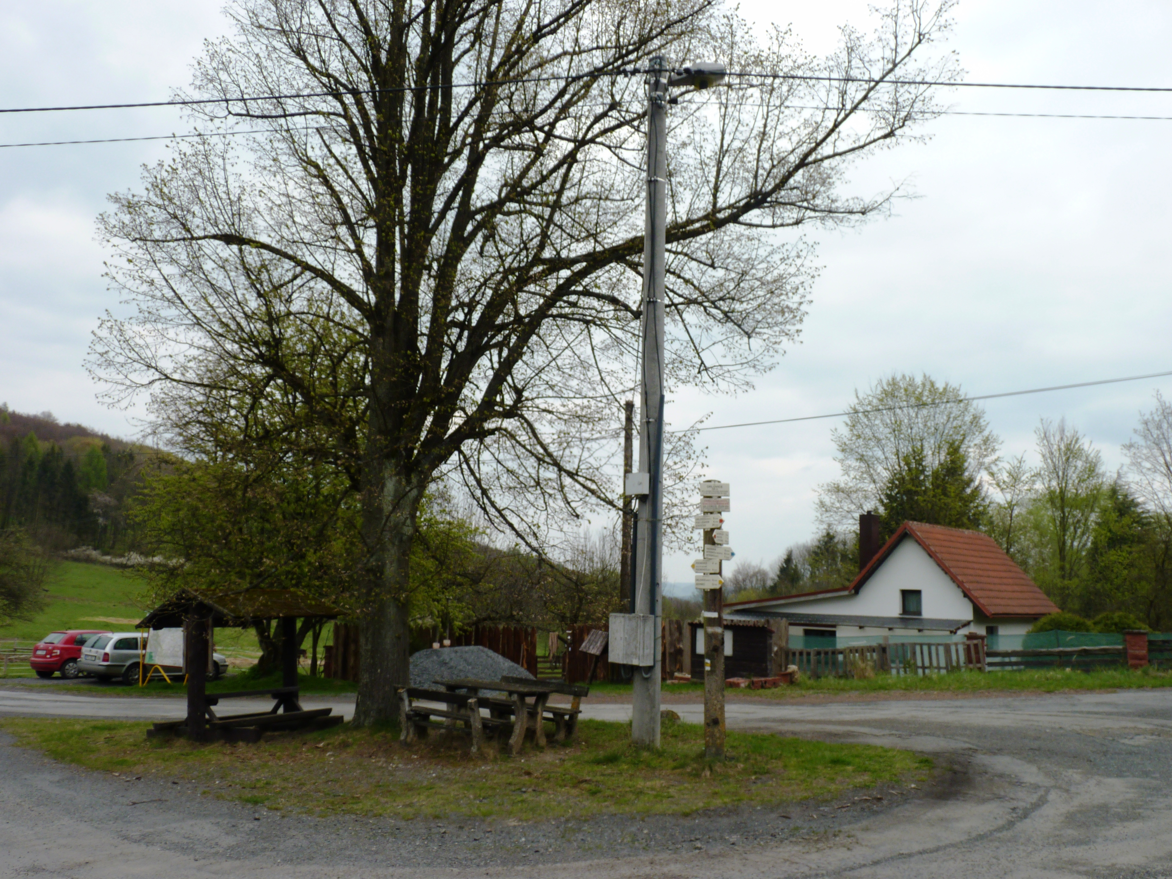 Orlovice, část obce Pocinovice.